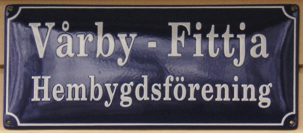 Vårby Fittja hembygdsföreningens skylt vid tvätterimuseet